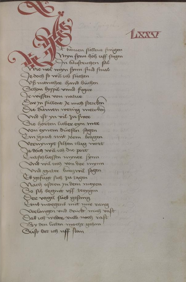 Erste Seite von Hermann von Sachsenheims „Des Spiegels Abenteuer“, zwischen 1451 und 1453.